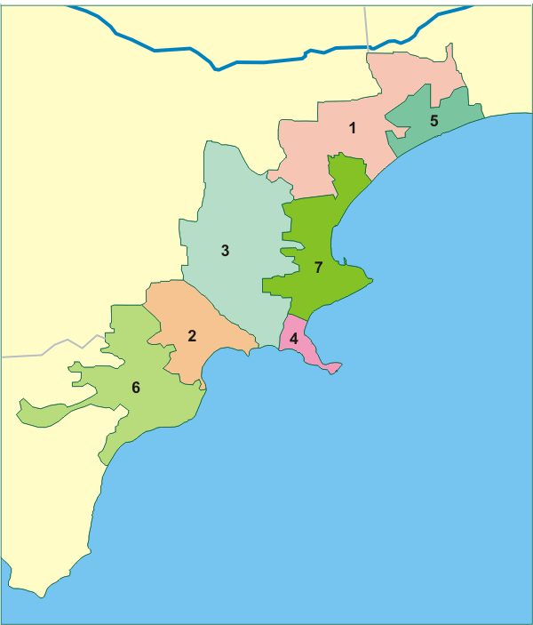 Феодосийский горсовет с населенными пунктами